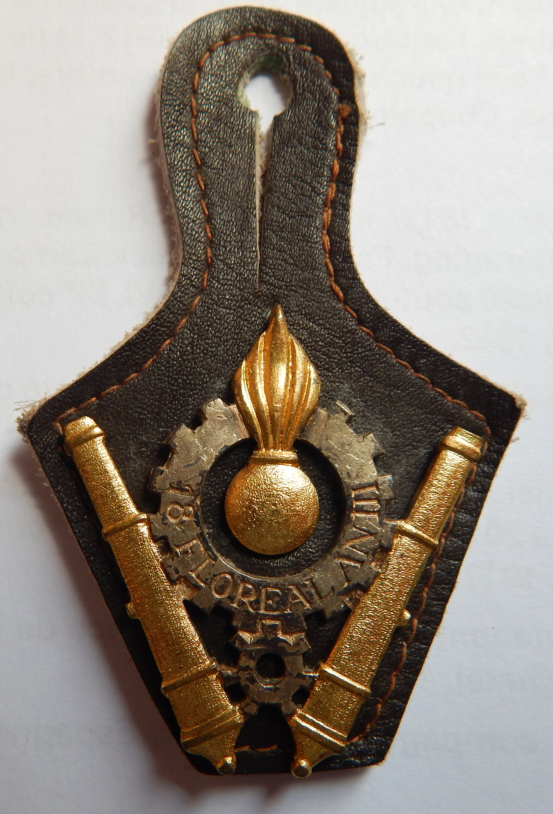 Pucelle portée par les militaires de la section Technique de l'Armée de Terre. Service Historique par la D.M no 1881-EMA /3-1 du 26 février 1946